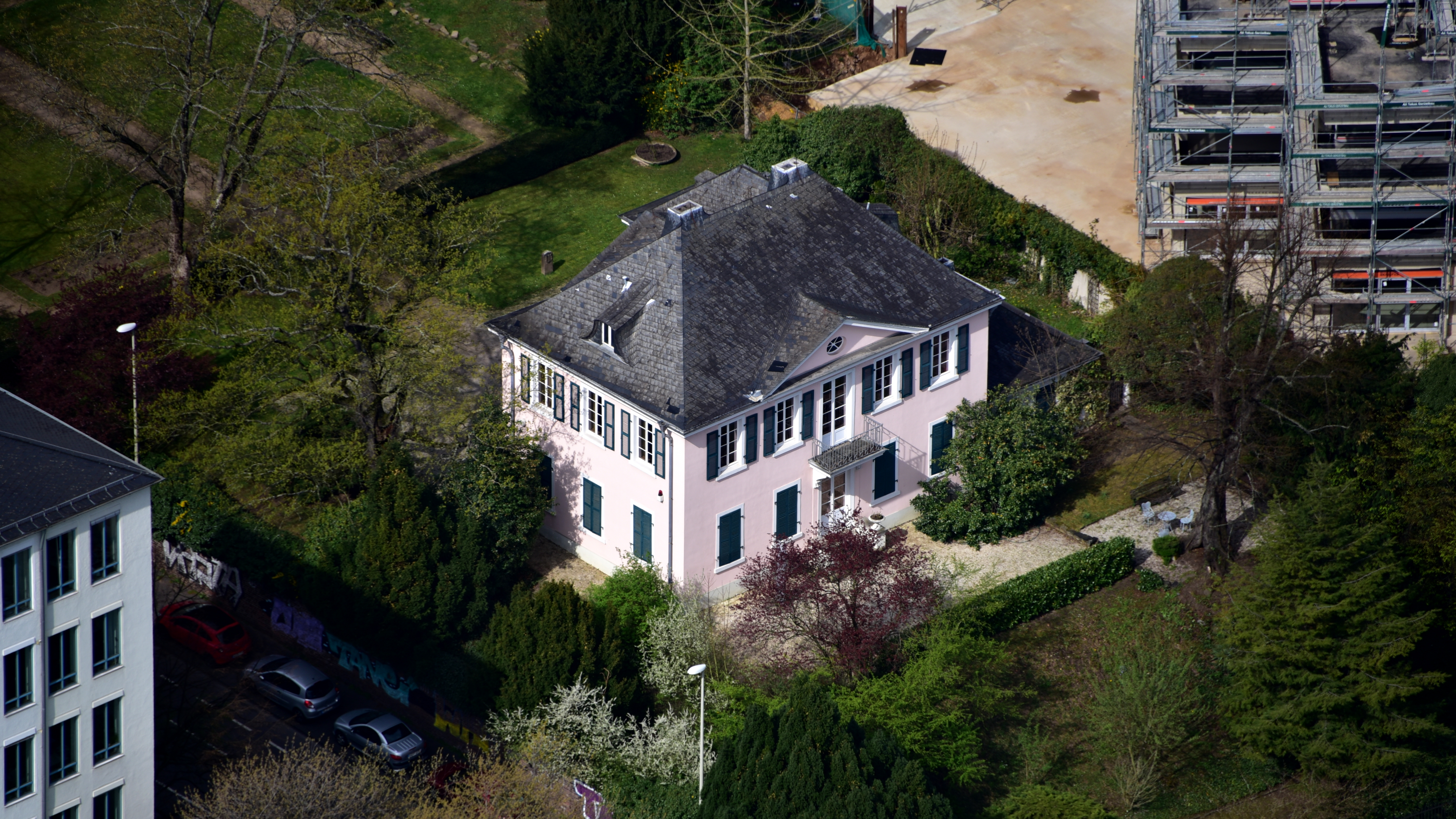 Ernst-Moritz-Arndt-Haus, Adenauerallee 79, Bonn-Südstadt: Luftaufnahme (2018)